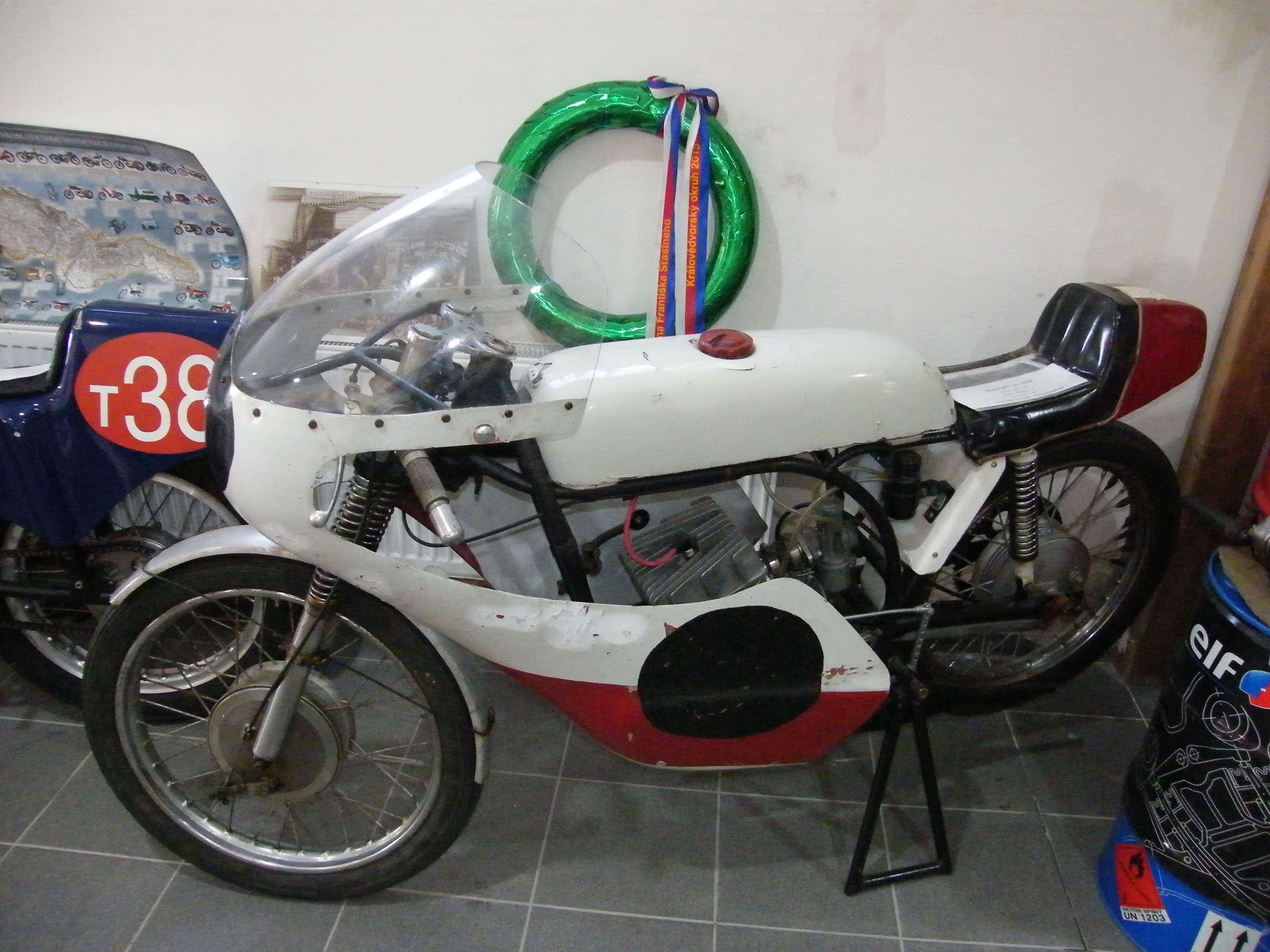 VAB 125 ccm (1967)